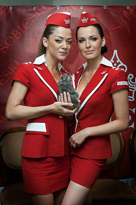 NikitA (Ukrainian pop group): DASHA ASTAFIEVA & NIKITA